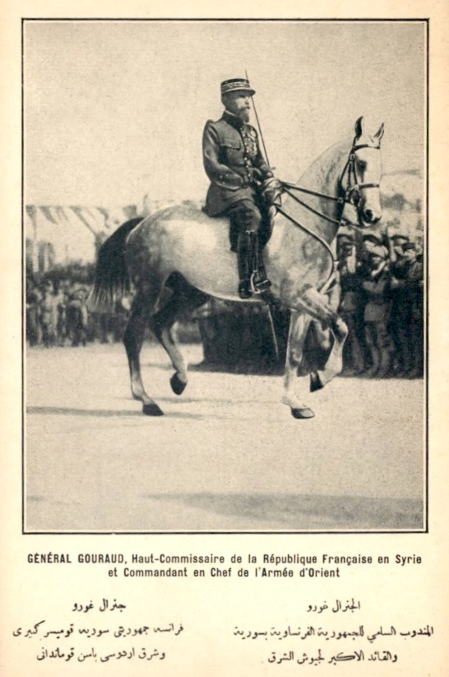 Général Gouraud, haut-commissaire en Syrie, 1920